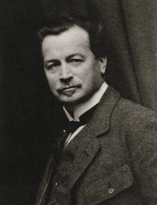 Fotograf Ferdinand Flodin (1863-1935)